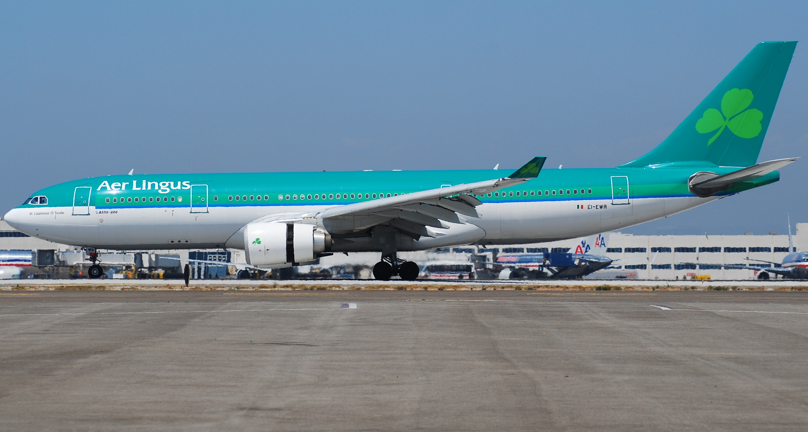 AER LINGUS